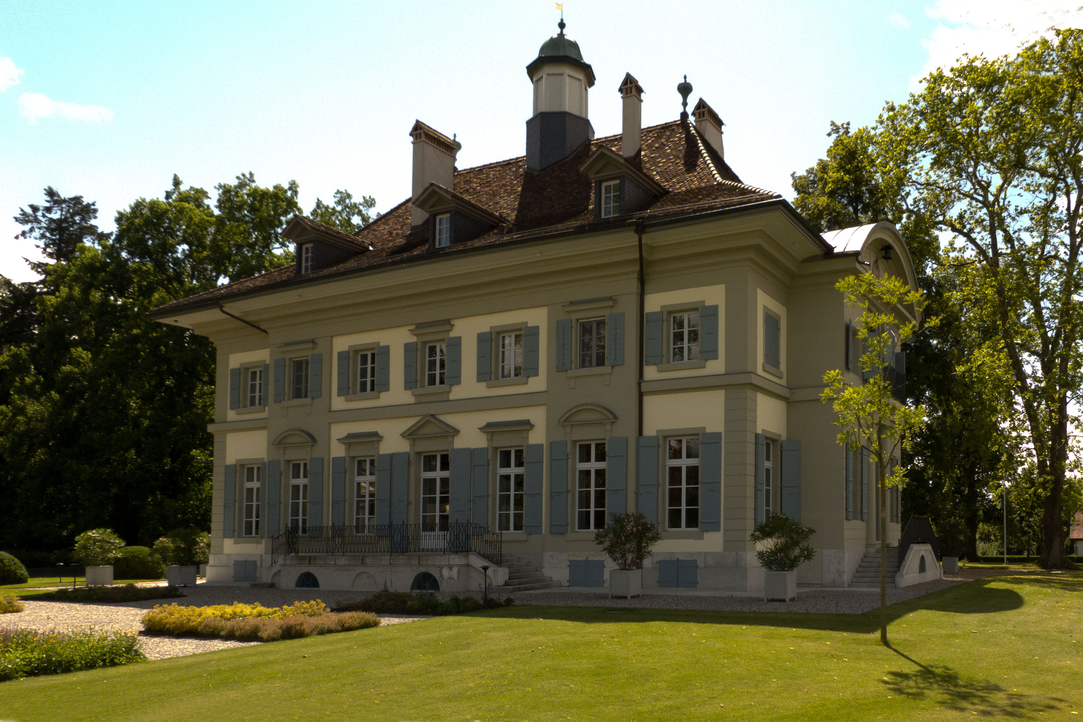 Schloss Hofwil, Privatbesitz